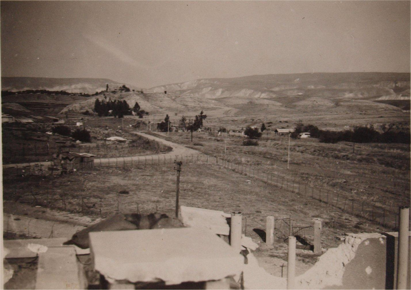 מבט ממשטרת גשר, 1948